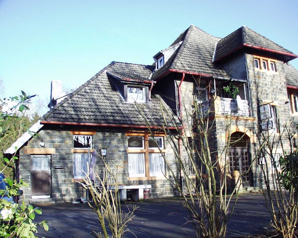 Ehemaliger Bahnhof von Oberwiehl, Ortsteil von Wiehl, Nordrhein-Westfalen, Deutschland